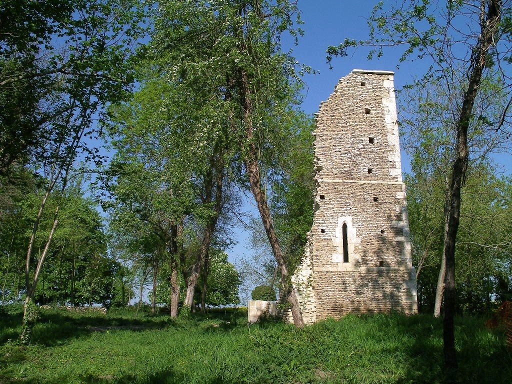 Tour de Valmeray à Airan (Calvados), site naturel classé (SC, 07/02/1935)